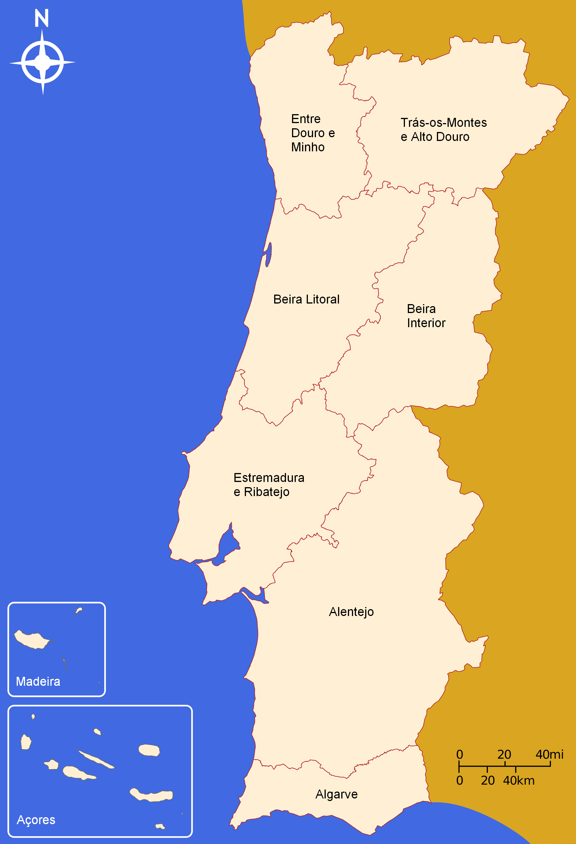 Mapa inicial da Proposta de Regionalização de Portugal em 7 regiões, resultantes da junção primária de províncias tradicionais.